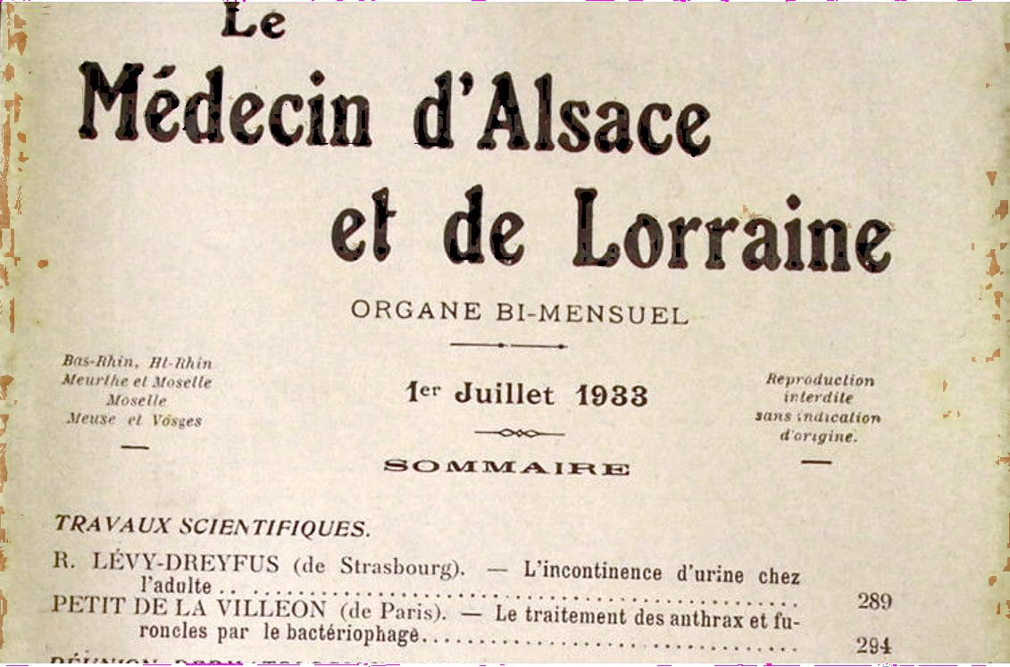 Extrait de la couverture du bulletin médical Le Médecin d'Alsace Lorraine du 1er juillet 1933